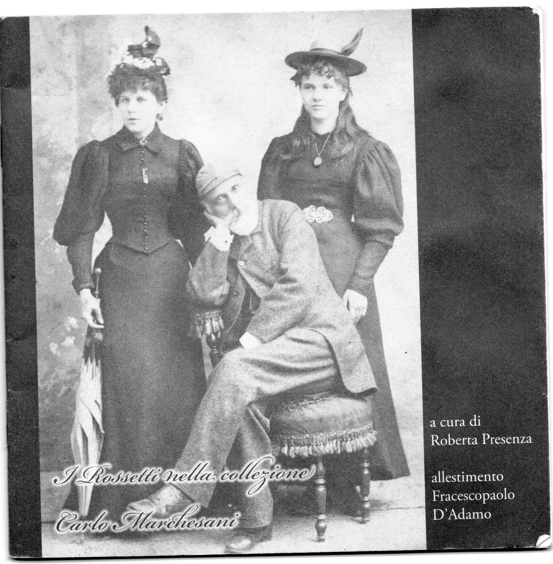 Frontespizio opuscolo mostra Vasto Agosto 2008 dal titolo "i Rossetti nella collezione di Carlo Marchesani" Nella foto William Michael Rossetti, e le figlie Olivia e Helen